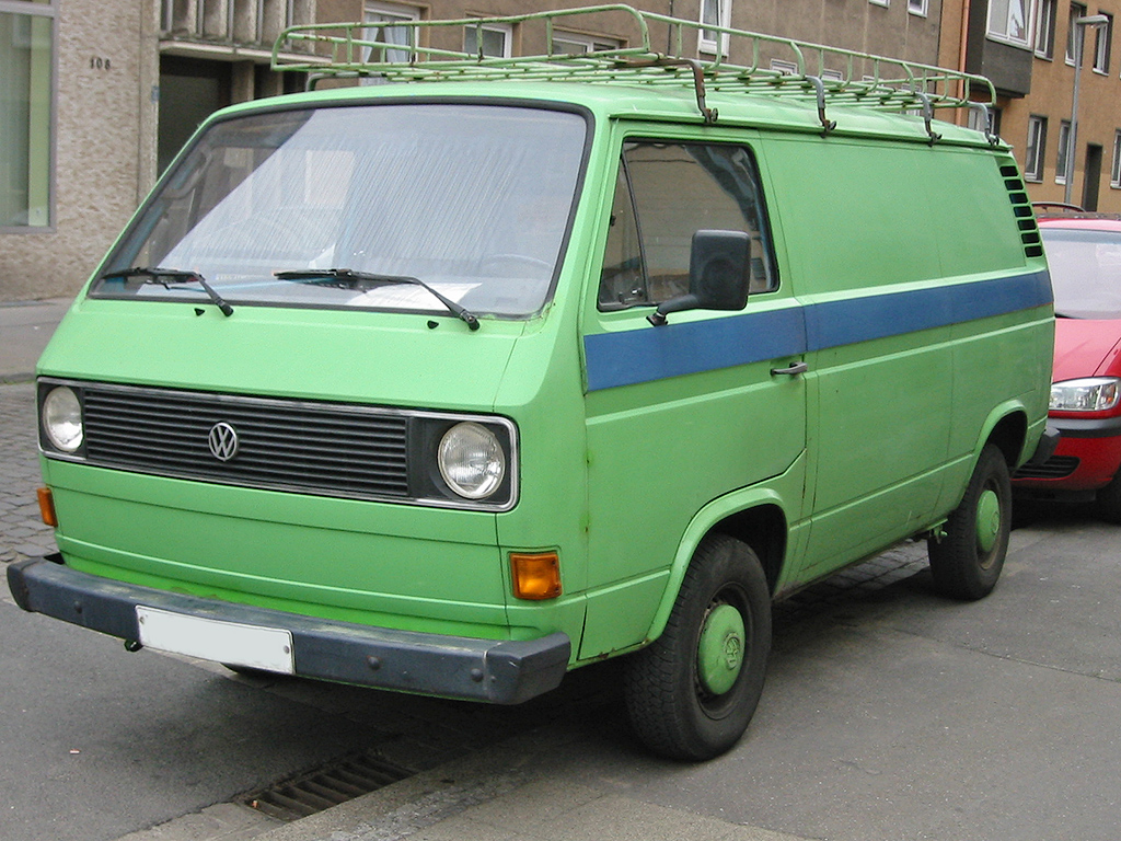 VW Transporter T3, luftgekühlt